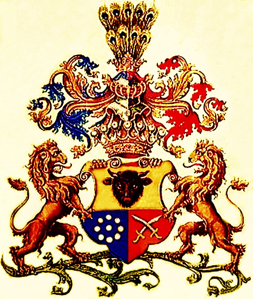 Wappen der Freiherren Nikolaus und Georg von Hormuzaki von 1881 und deren Nachfahren